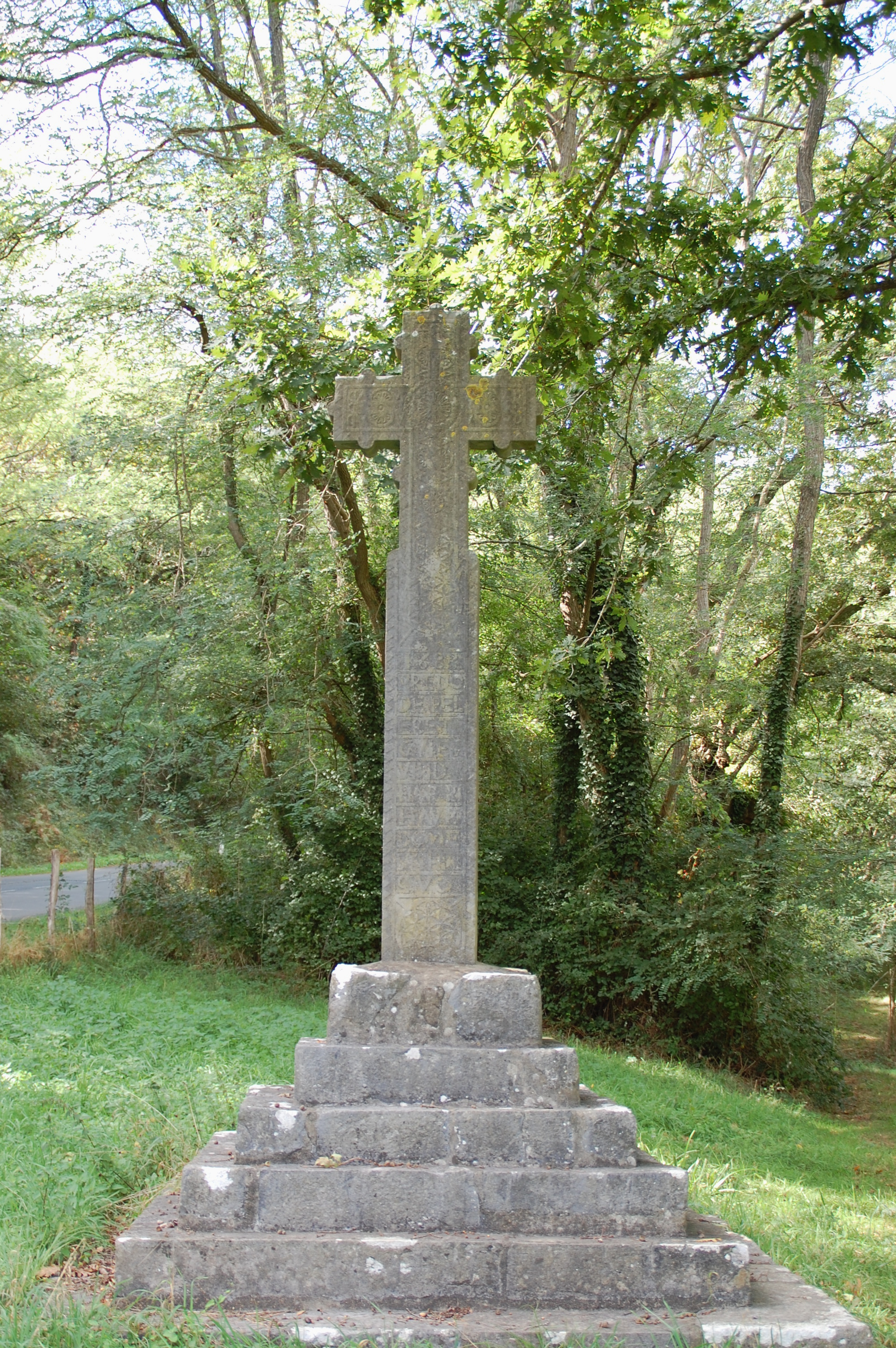 Croix de chemin à Saint-Esteben où est écrit en basque : "1683, PREDO DE PELERETEGUI EGUIN DU HARRI HAU R? D??E BETHI E?UO" (Pierre de Peleretegui a réalisé cette pierre ? toujours ?).